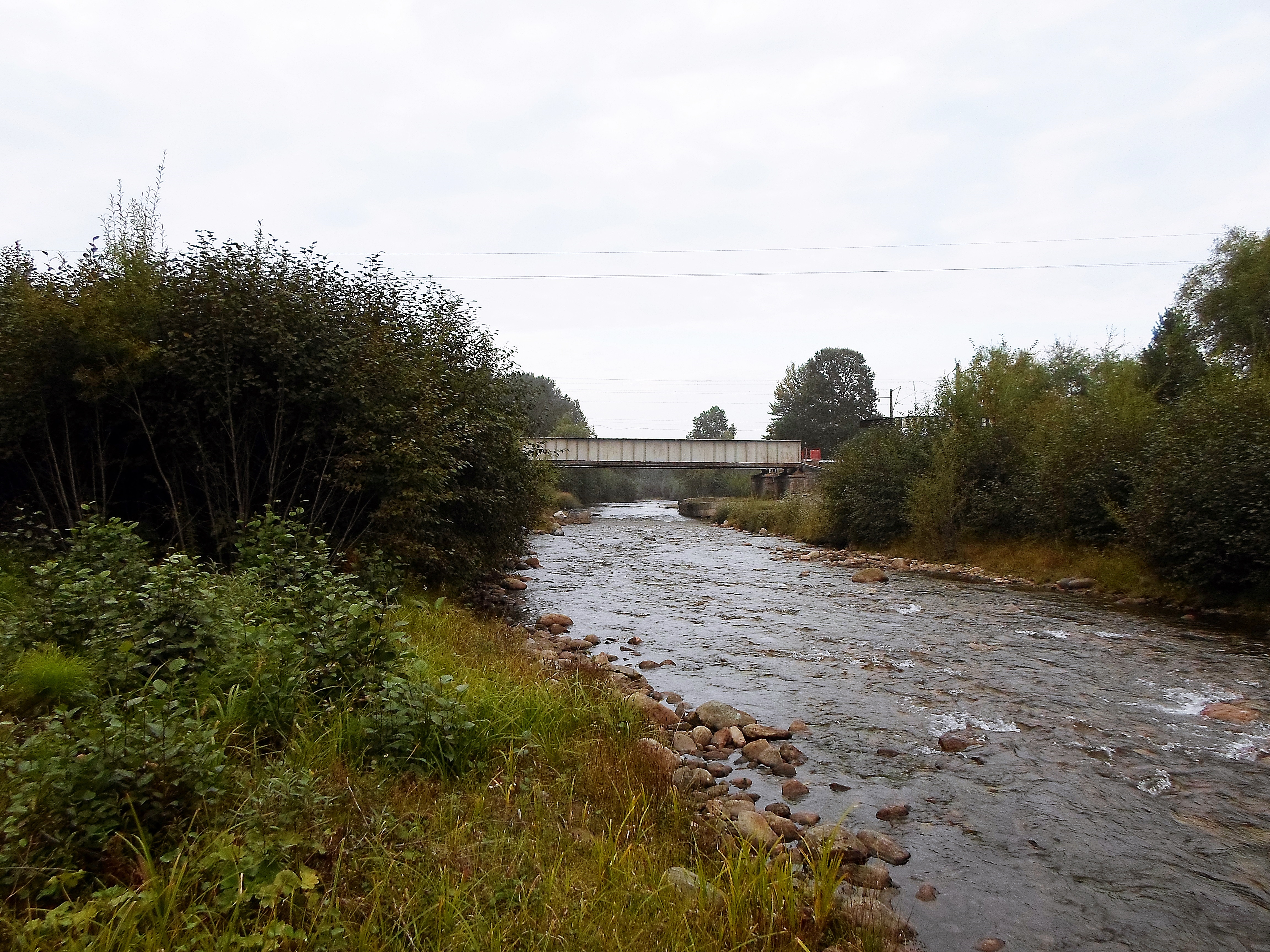 Река Осиновка у западной окраины посёлка Танхой в 500 метрах от впадения в Байкал. Вид на север на часть железнодорожного моста Транссиба.